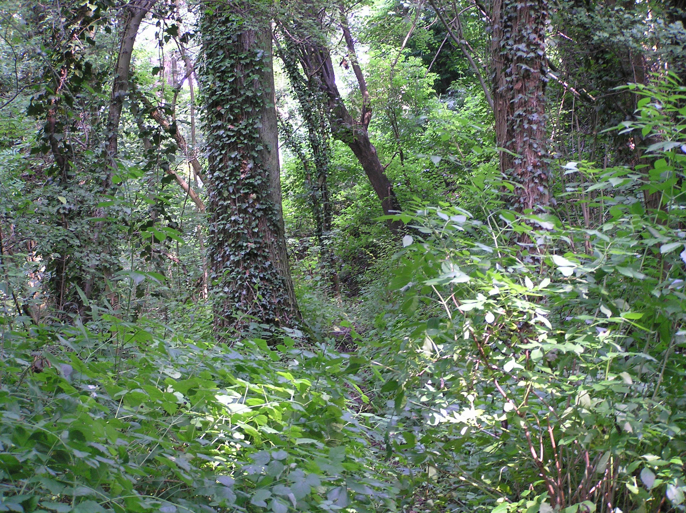 Essenbronbos op een smal terras in het Bunderbos. Door bodemafspoeling worden deze terrassen voedselrijker. De hoge voedselrijkdom is af te lezen aan het voorkomen van Gewone vlier, Grote brandnetel en Zevenblad.(Foto: B. de Rooy) Categorie:Afbeelding landschap